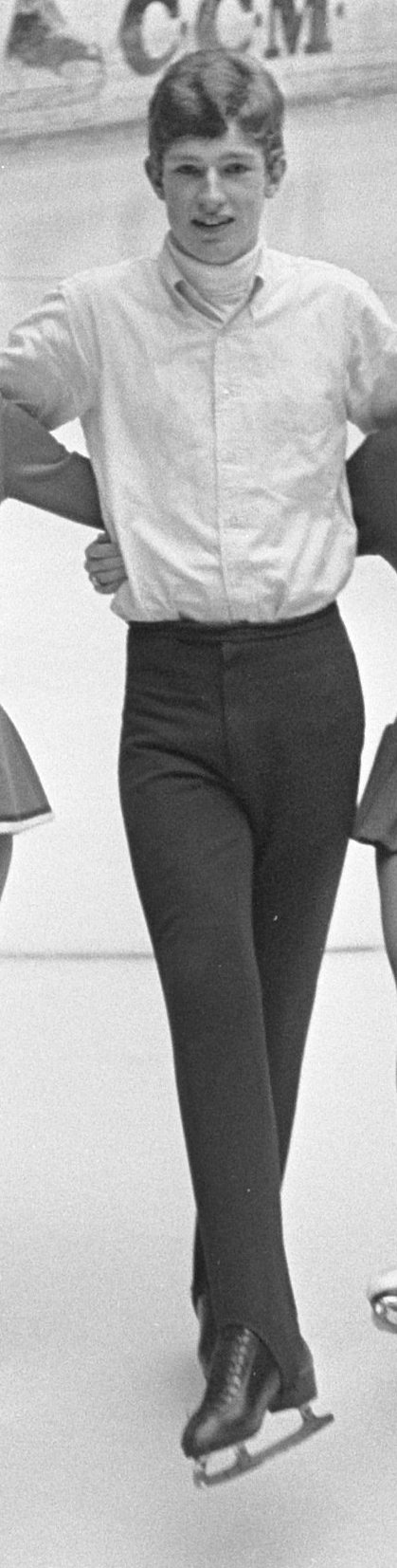 Collectie / Archief : Fotocollectie Anefo Reportage / Serie : Nederlandse Kampioenschappen kunstschaatsen 1967 op de Hokij (Houtrusthallen) in Den Haag Beschrijving : V.l.n.r. de deelnemers Anneke Heyt, Willy de Zoete, Marie Jouwstra, Arnoud Hendriks, Rieneke Zendijk, Anneke Roel en Astrid Feiertag Annotatie : Arnoud Hendriks was de enige mannelijke deelnemer Datum : 15 maart 1967 Locatie : Den Haag, Zuid-Holland Trefwoorden : ijsdansen, kunstschaatsen, sport Persoonsnaam : Feiertag, Astrid, Hendriks, Arnoud, Heyt, Anneke, Jouwstra, Marie, Roel, Anneke, Zendijk, Rieneke, Zoete, Willy de Fotograaf : Fotograaf Onbekend / Anefo Auteursrechthebbende : Nationaal Archief Materiaalsoort : Negatief (zwart/wit) Nummer archiefinventaris : bekijk toegang 2.24.01.05 Bestanddeelnummer : 920-1643